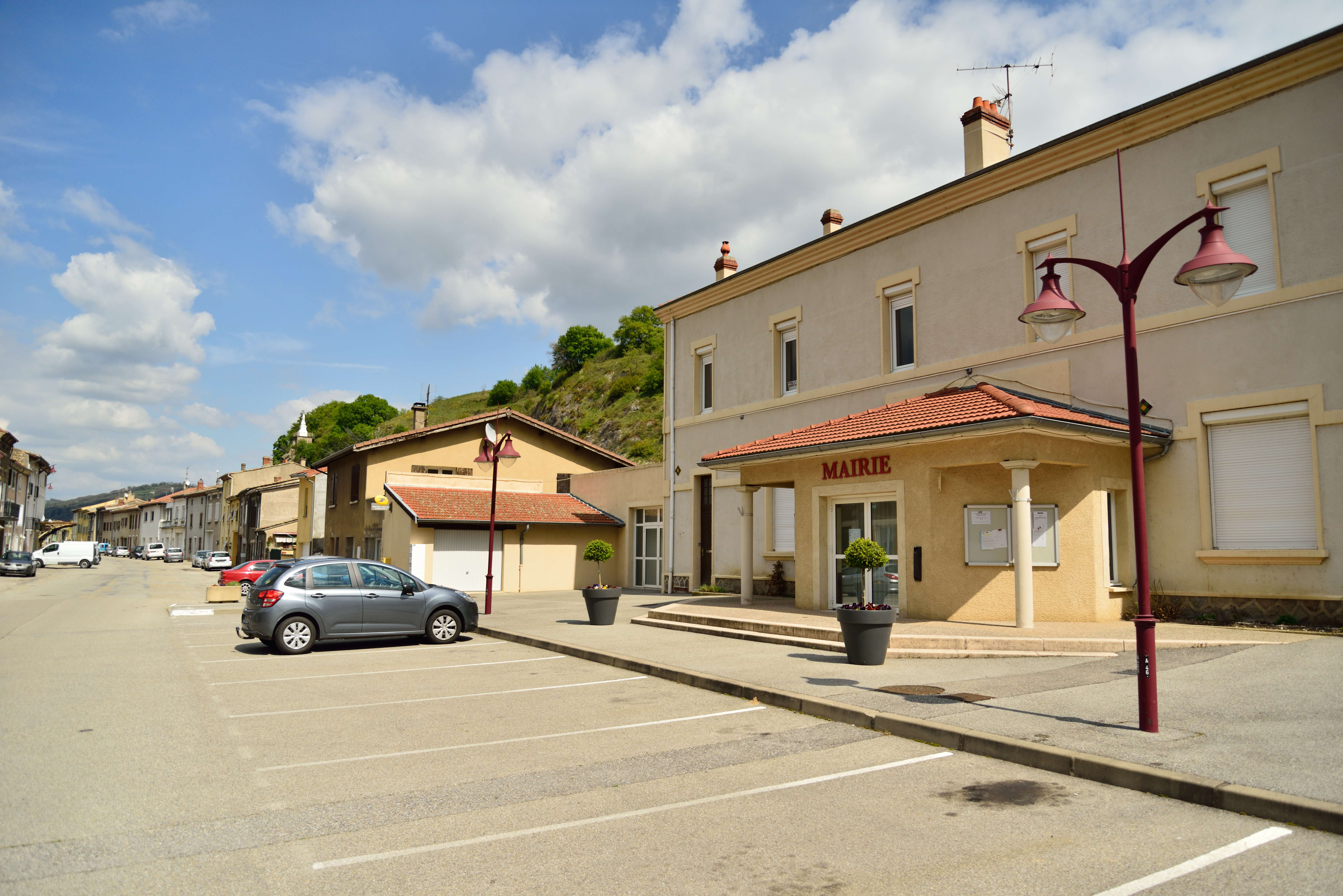 la mairie de serves